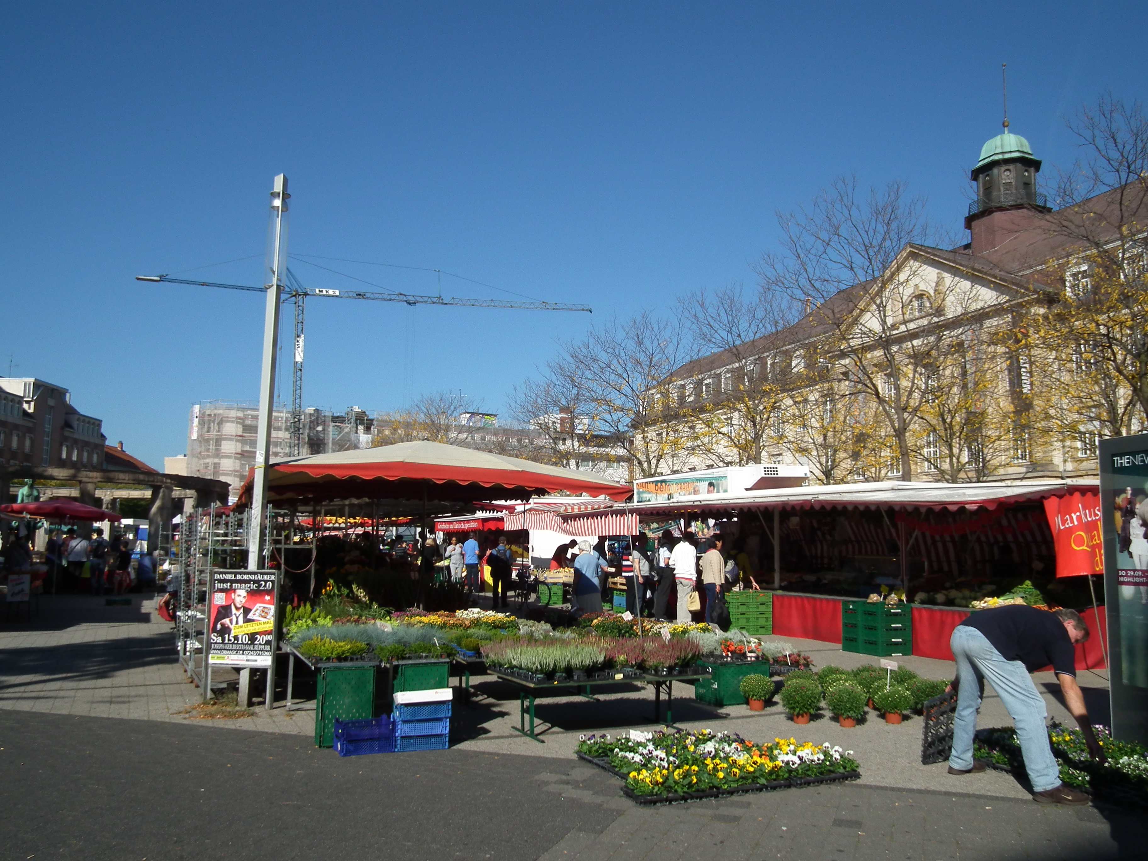 Wochenmarkt auf dem Stephanplatz in Karlsruhe (Baden-Württemberg, Deutschland)